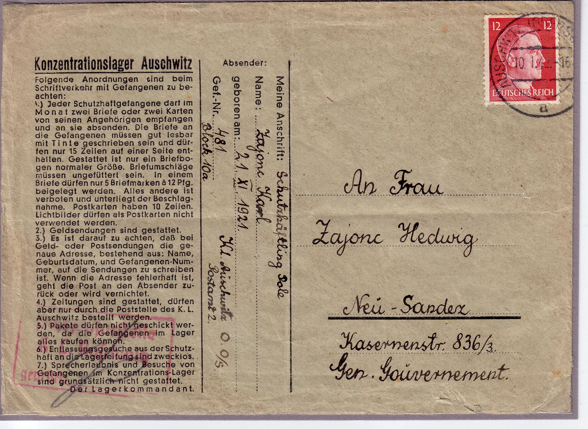 Häftlingsbrief aus dem KZ Auschwitz in Oberschlesien von 1942. * Poststempel: "Auschwitz, 1942"